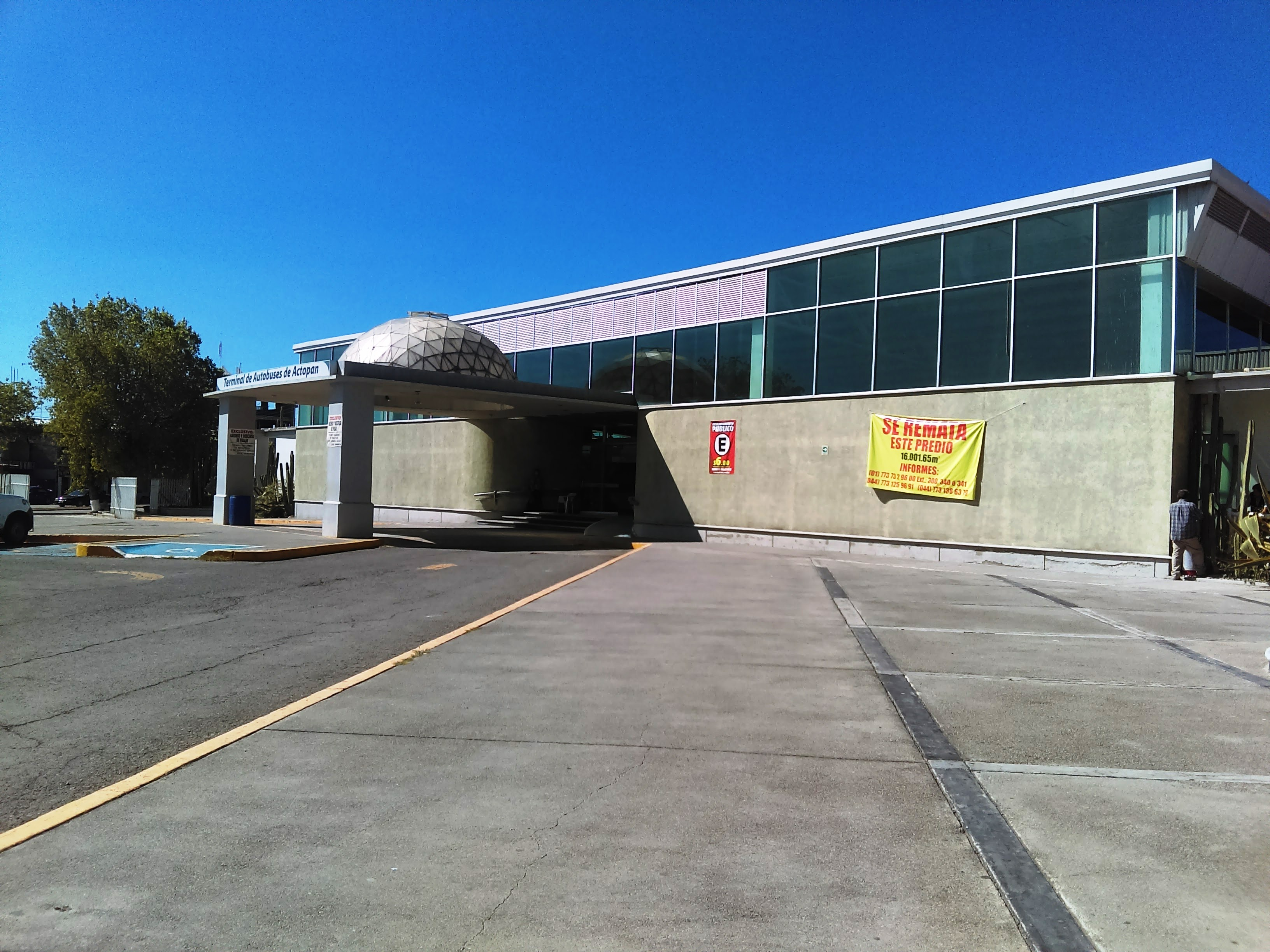 Terminal de Autotransportes de Actopan